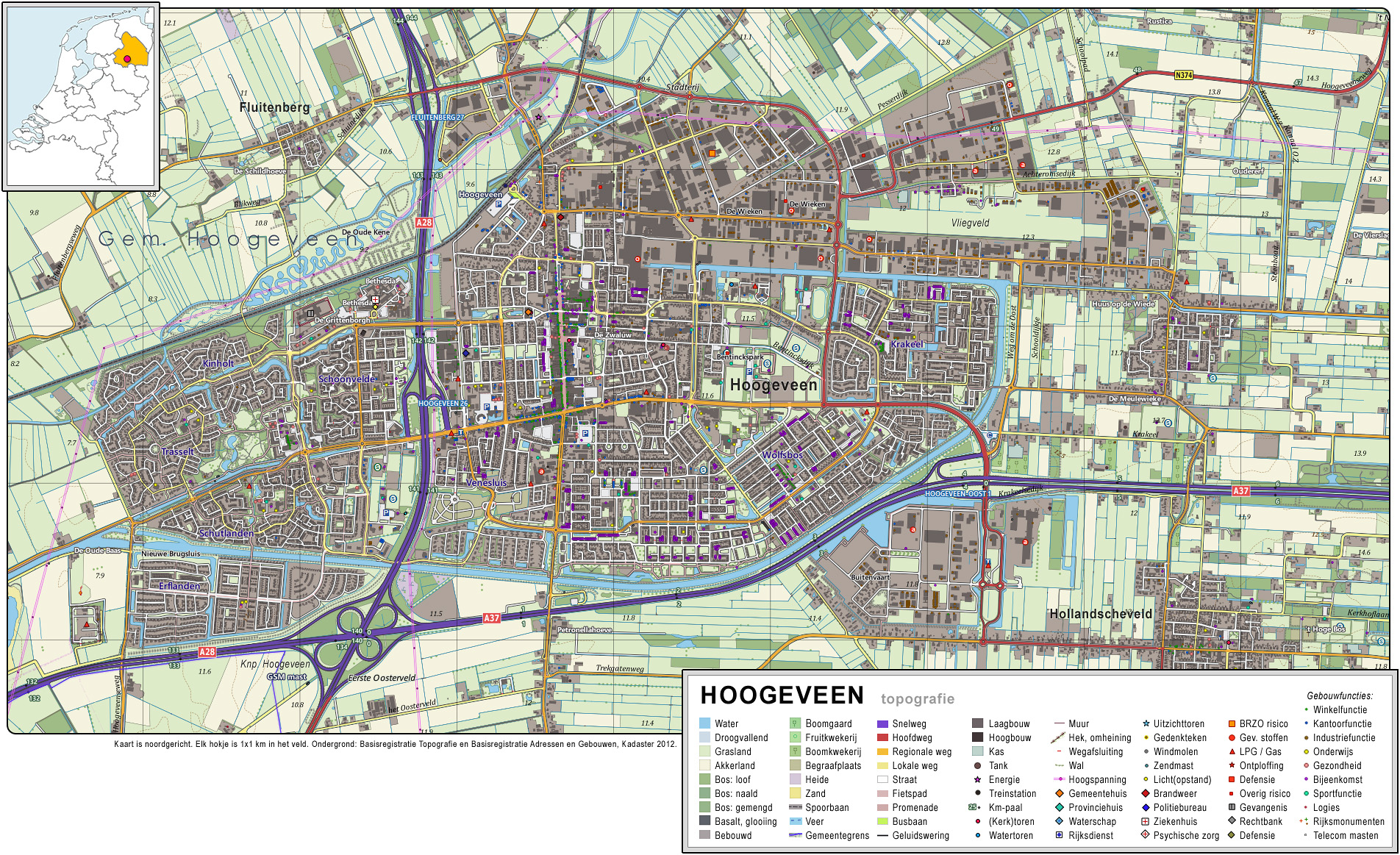 Topografisch beeld van de stad Hoogeveen. Op basis van de GML open geodata van de BRT/Top10NL (basisregistratie Topografie, Kadaster 2012), vrijgegeven door Kadaster op 30-11-2012 onder de Creative Commons BY licentie. Gebouwvlakken vanuit Open Geodata BAG extract (december 2012). Samenstelling en kleurenschema: Jan-Willem van Aalst.